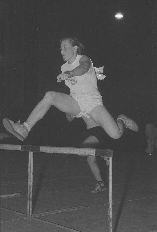 Original image description from the Deutsche Fotothek Bild Portrait einer Läuferin der Sportvereinigung Wissenschaft beim Nehmen einer Hürde in Halle II